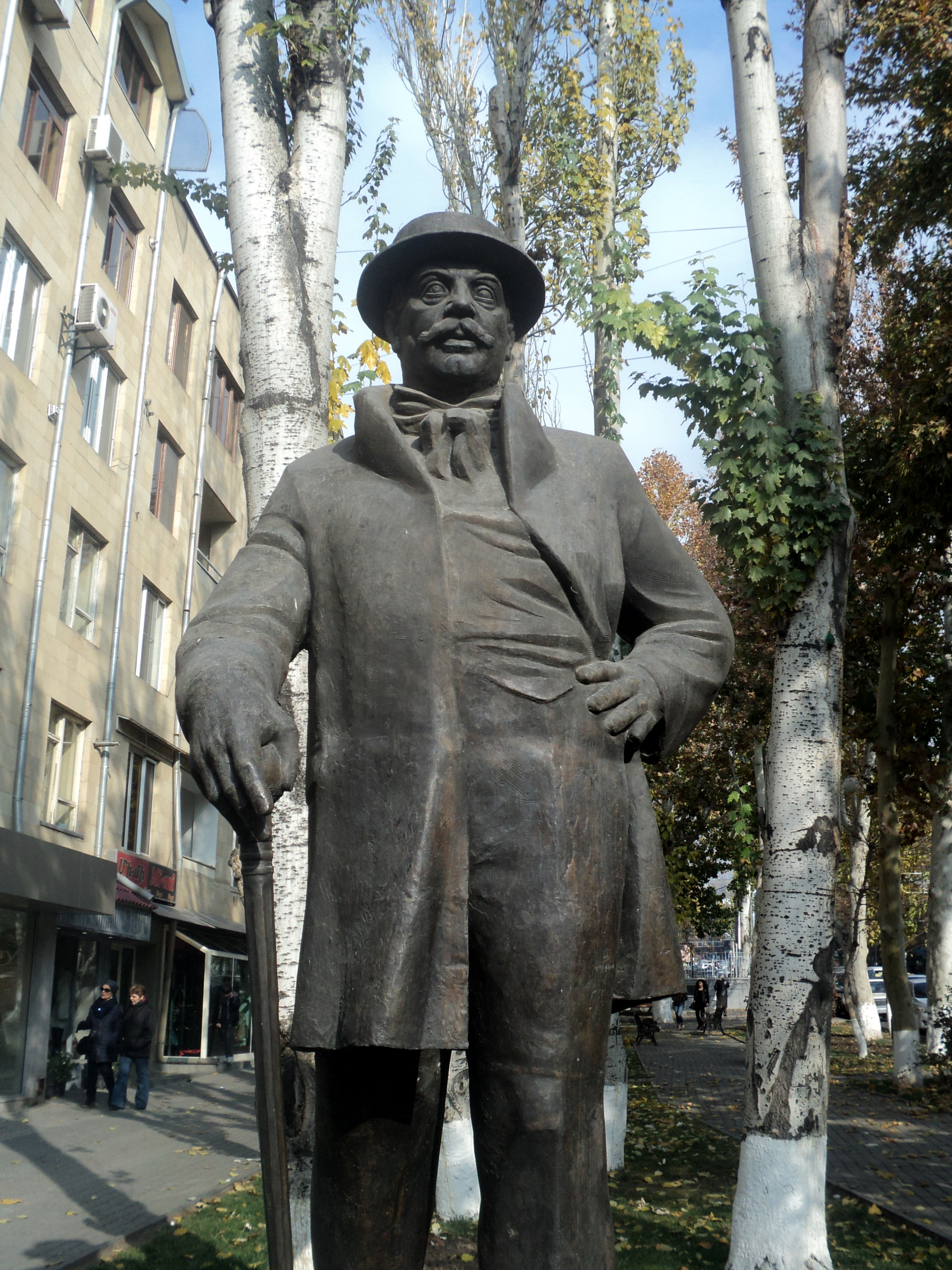 Քանդակագործ Տիգրան Արզումանյան